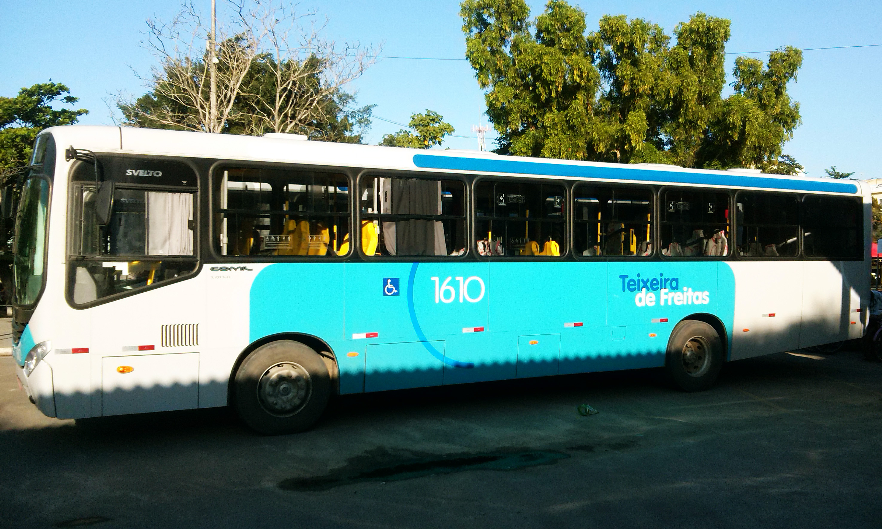 Ônibus utilizado no transporte público de Teixeira de Freitas (BA).